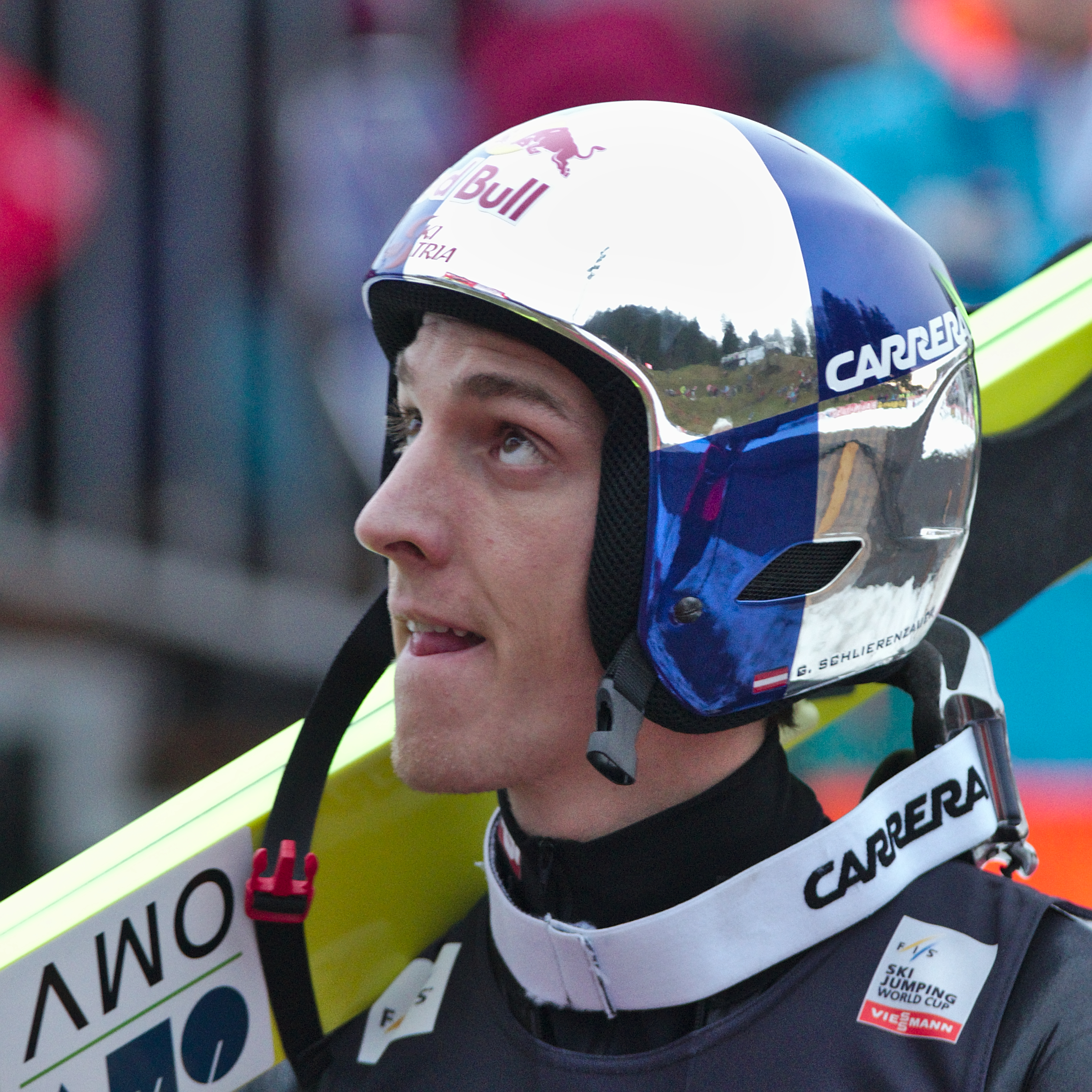 FIS Ski Jumping World Cup 2014 - Engelberg - 20141220 - Gregor Schlierenzauer